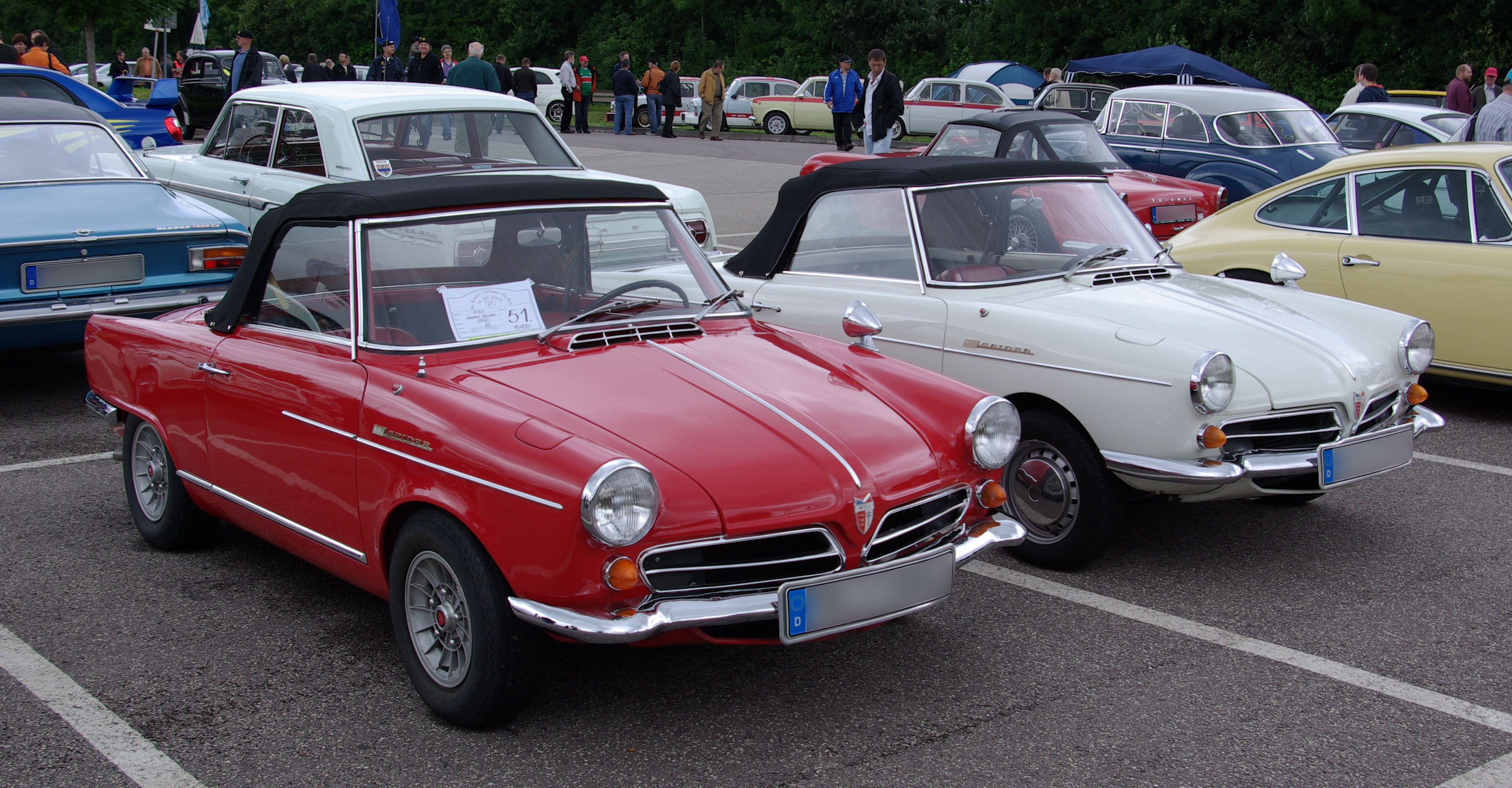 NSU Wankel Spider, Baujahr 1967, 50 PS , aufgenommen bei / photographed at "Internationales Konzer Oldtimer-Treffen" am 20. Juli 2008